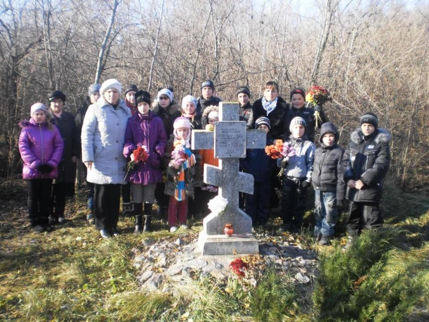 Памятний знак жертвам голодомору